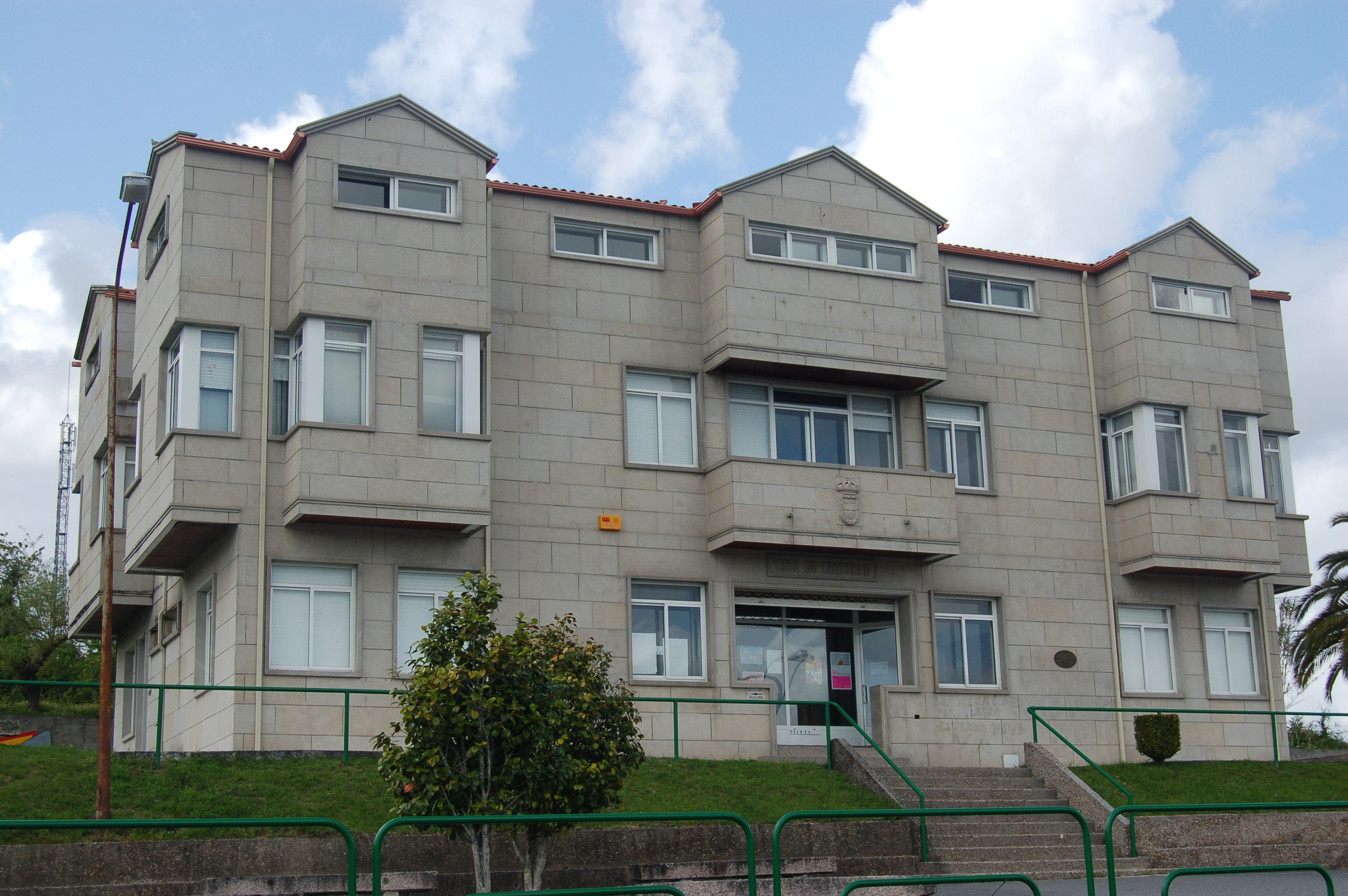 Casa consistorial de Vilaboa